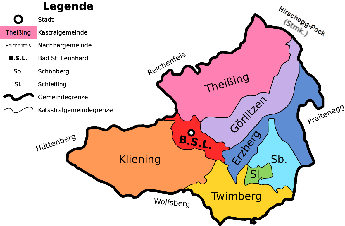 Die Kastralgemeinden von Bad St. Leonhard im Lavanttal